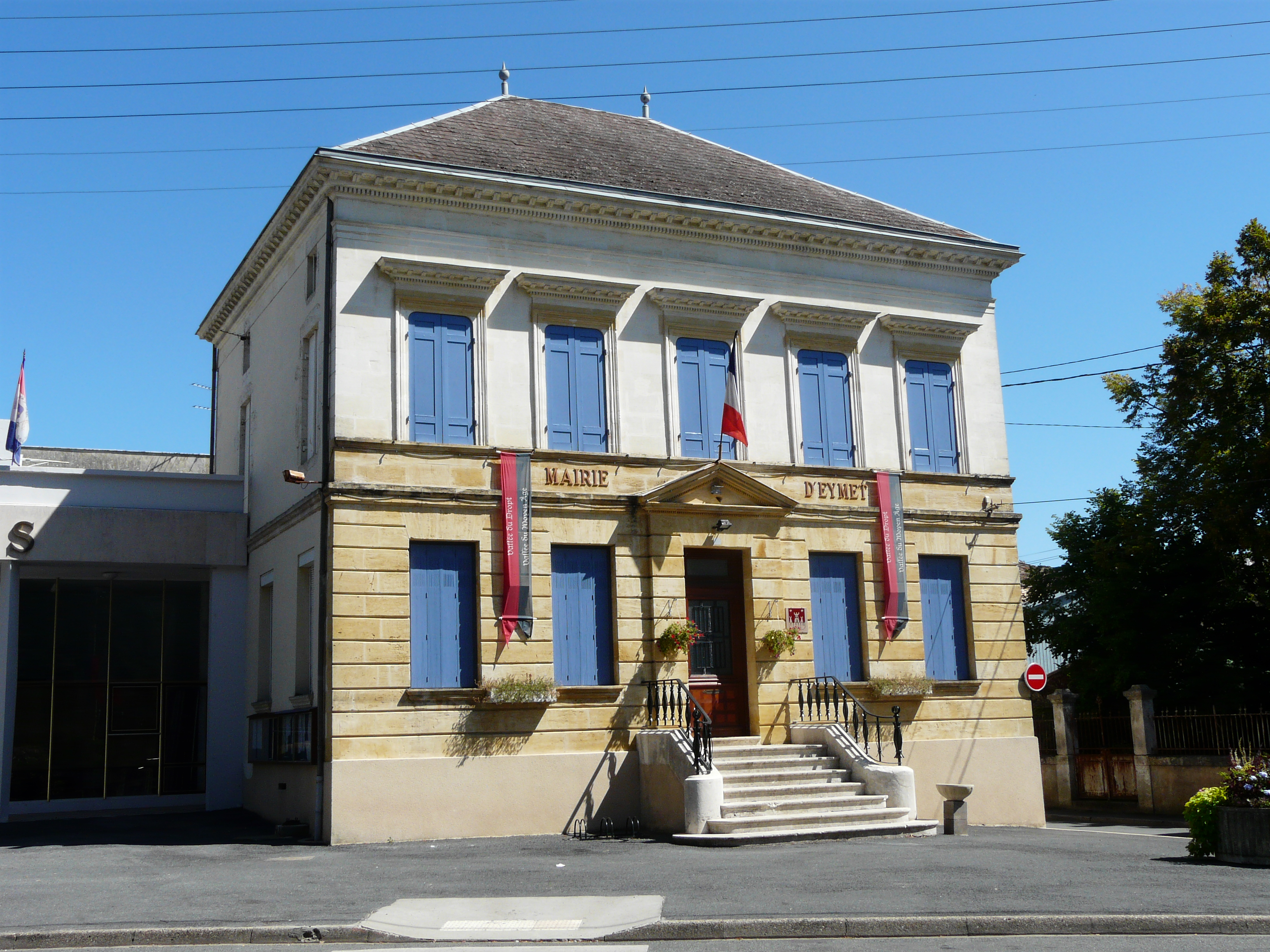 La mairie d'Eymet, Dordogne, France